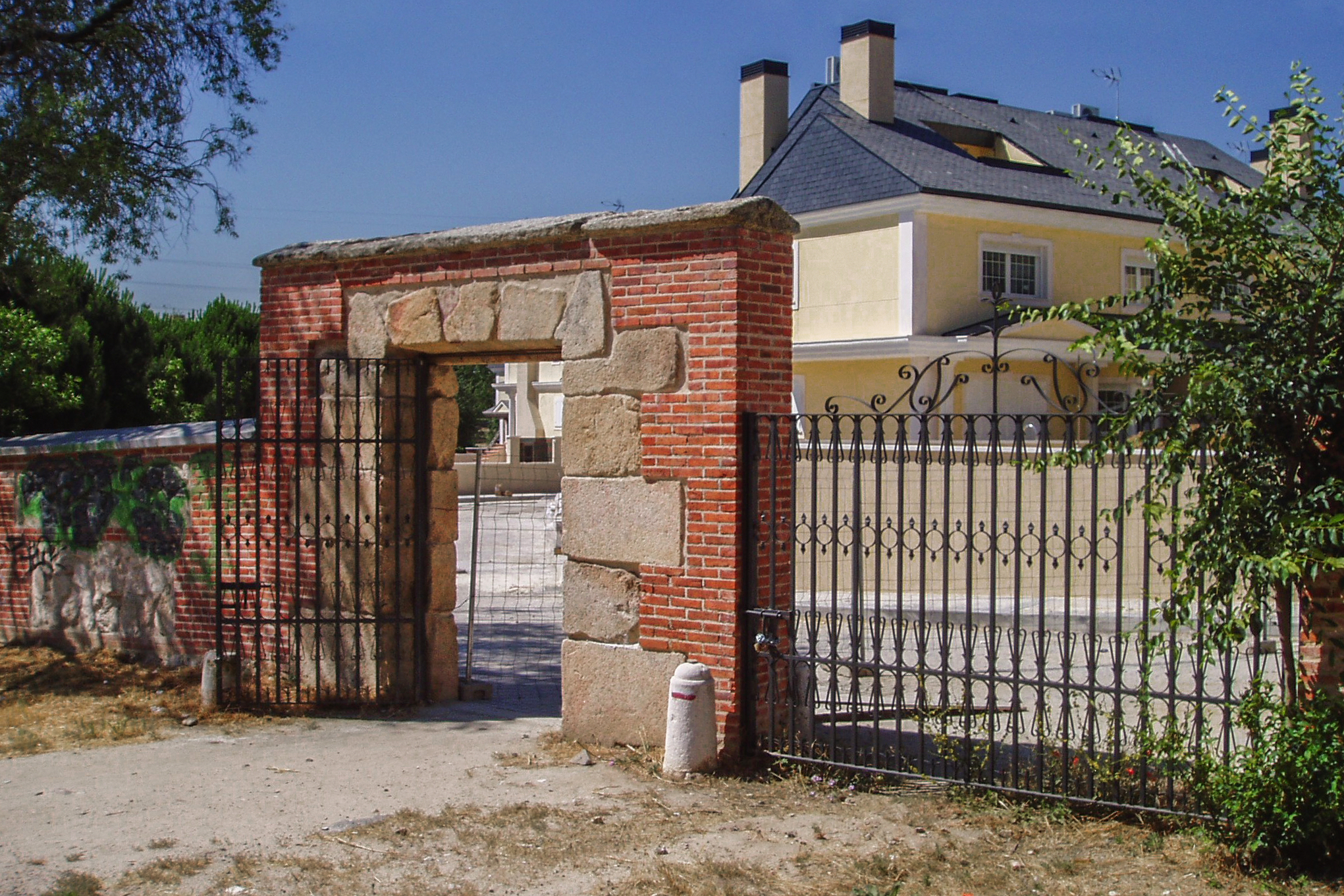 Puerta del Zarzón. Casa de Campo. Madrid. España